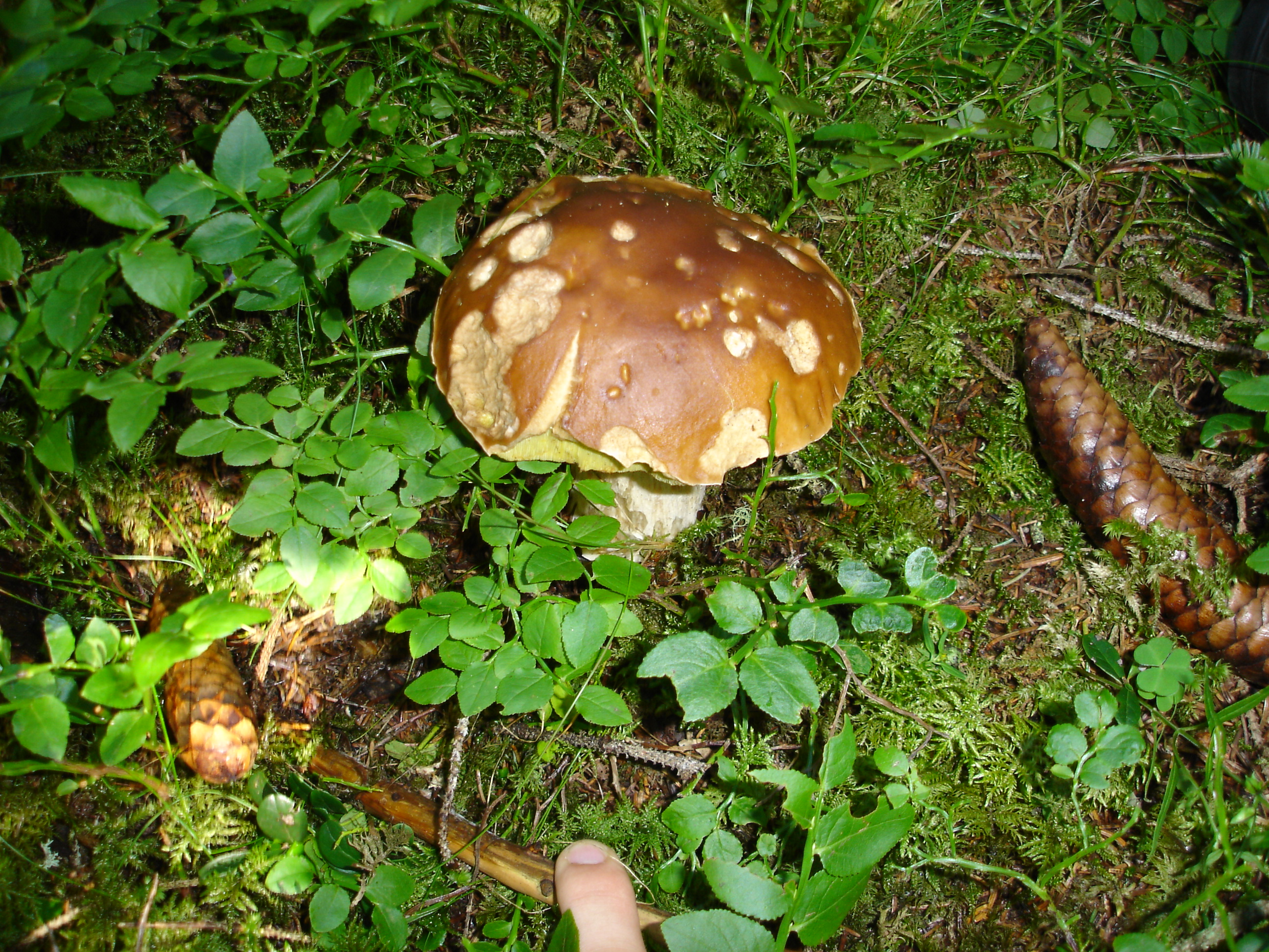 Porcino